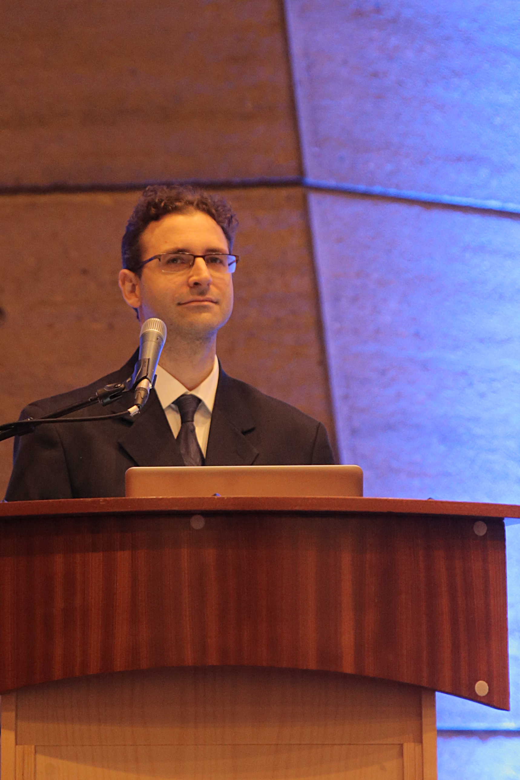 Chuck Smith en la Pariza sidejo de Unesko okaze de memorfesto de la 100-a morto-datreveno de Zamenhof